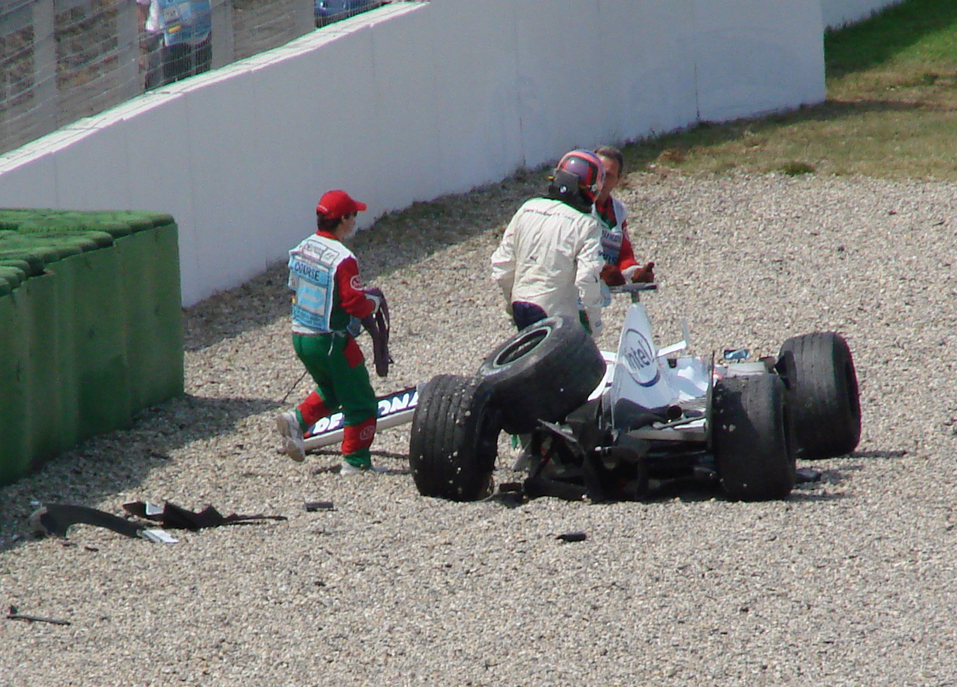 Jacques Villeneuve Germany 2006, F1 name: (BMW Sauber F1.06)